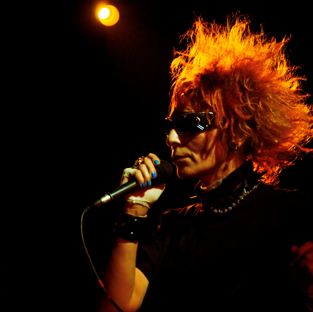 Жанна Агузарова 3 июня 2007, Москва